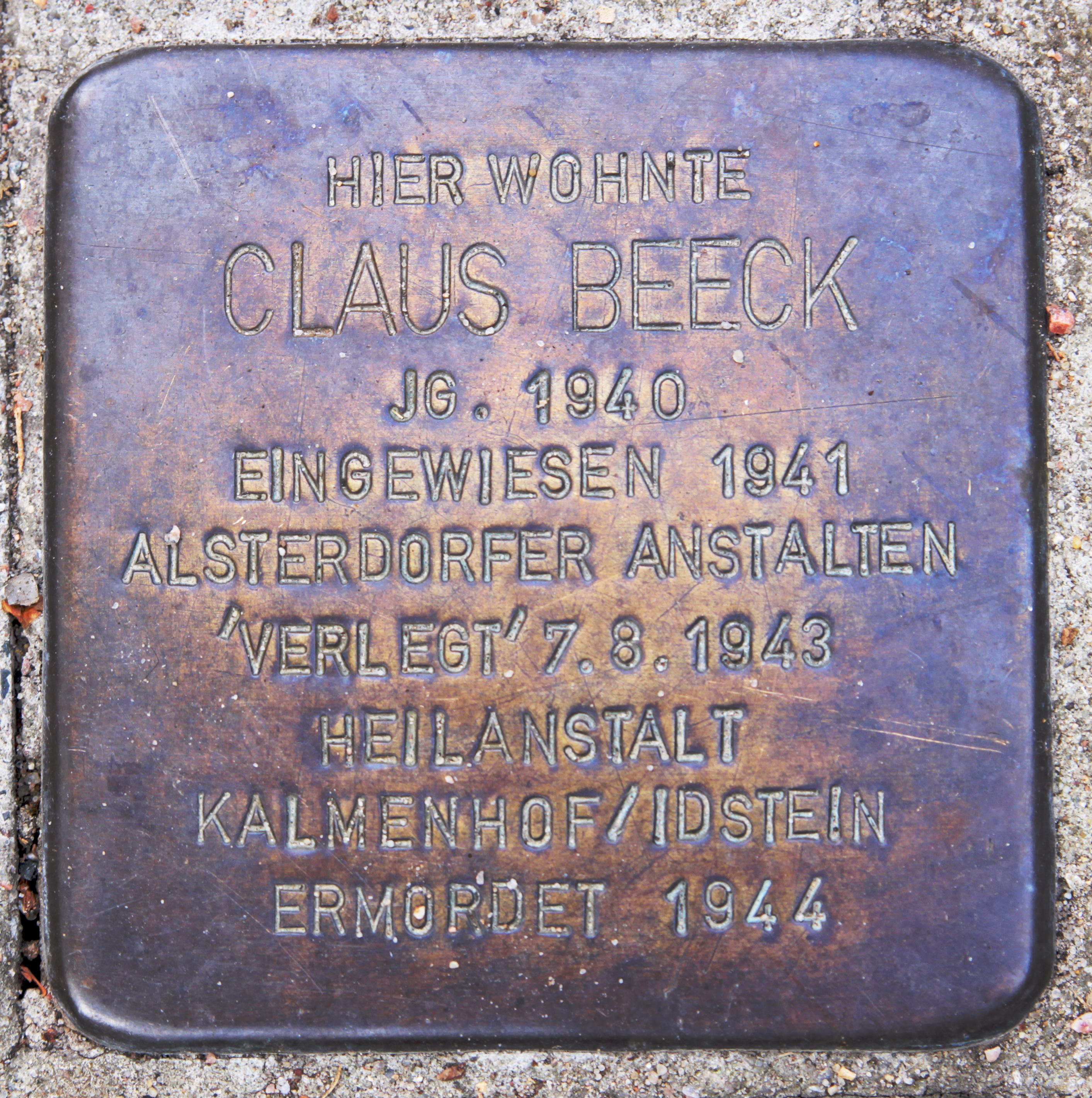 Stolperstein für Claus Beeck in der August-Bebel-Straße 101 – 105 in Hamburg-Bergedorf